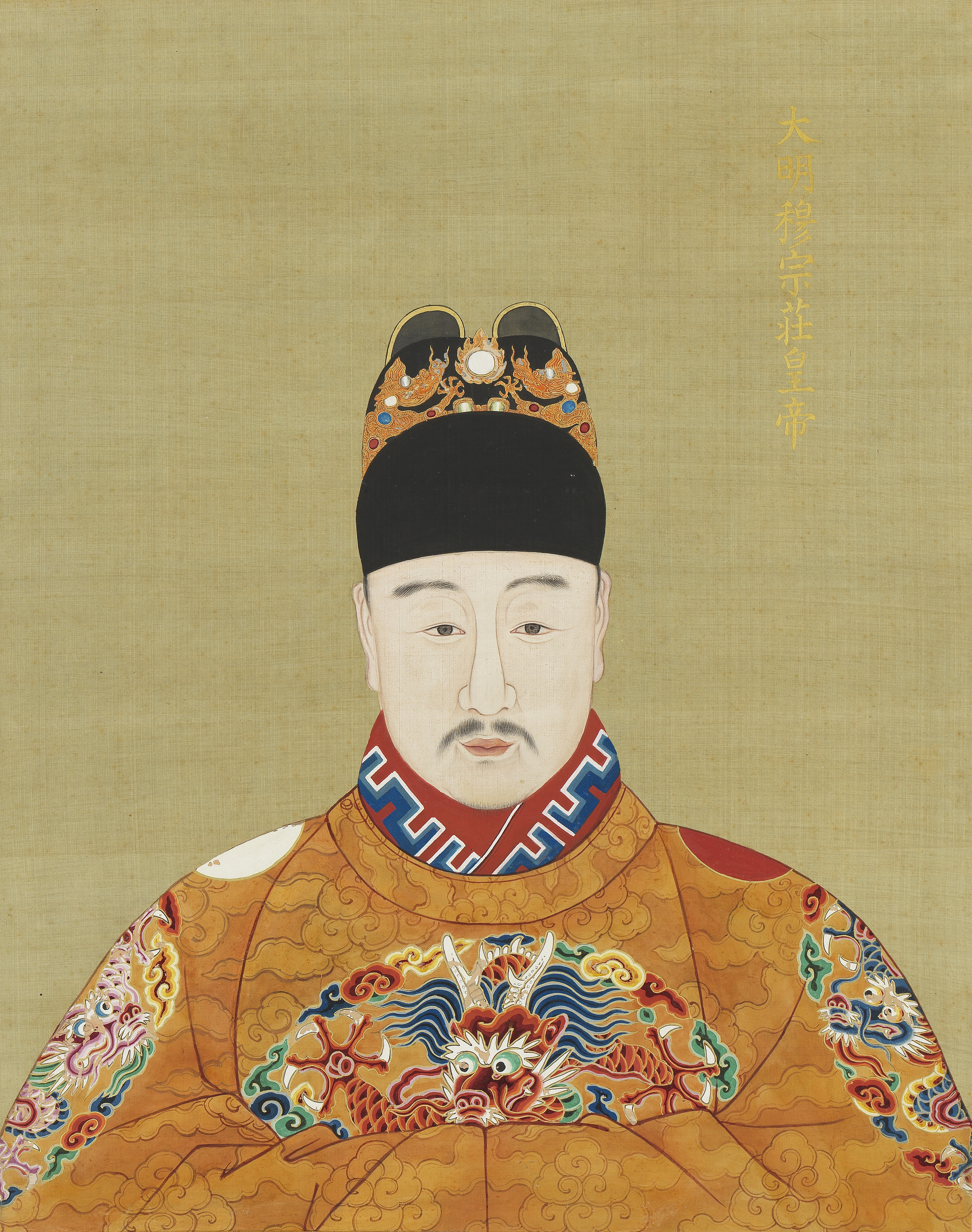 中文（中国大陆）: 作者已经去世超过200年，作品已经进入公有领域。